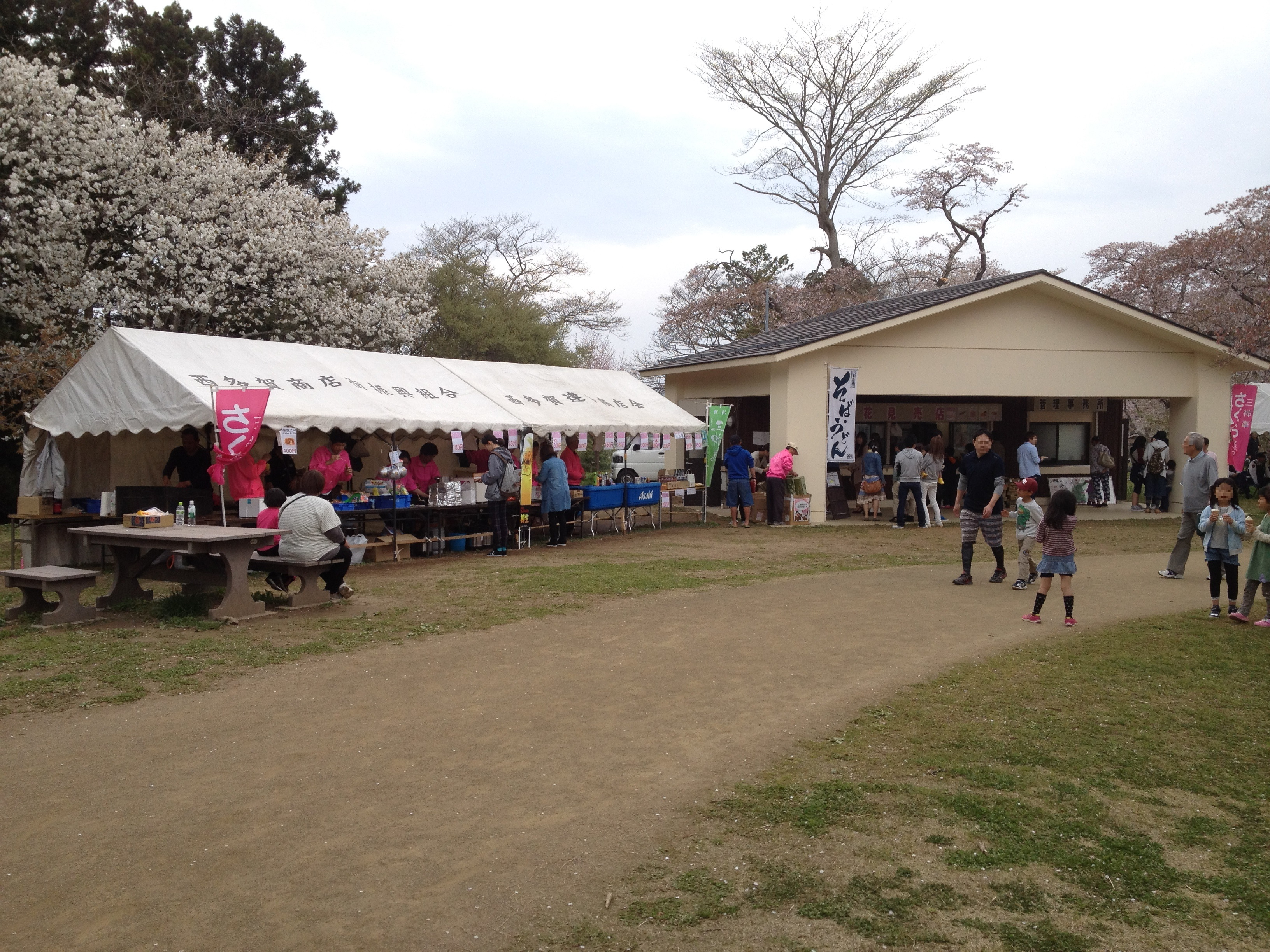 三神峯公園・花見売店の様子（2015年4月）